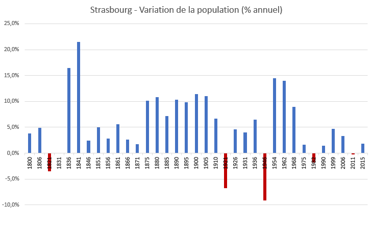 Variation de la population de Strasbourg de 1800 à 2015